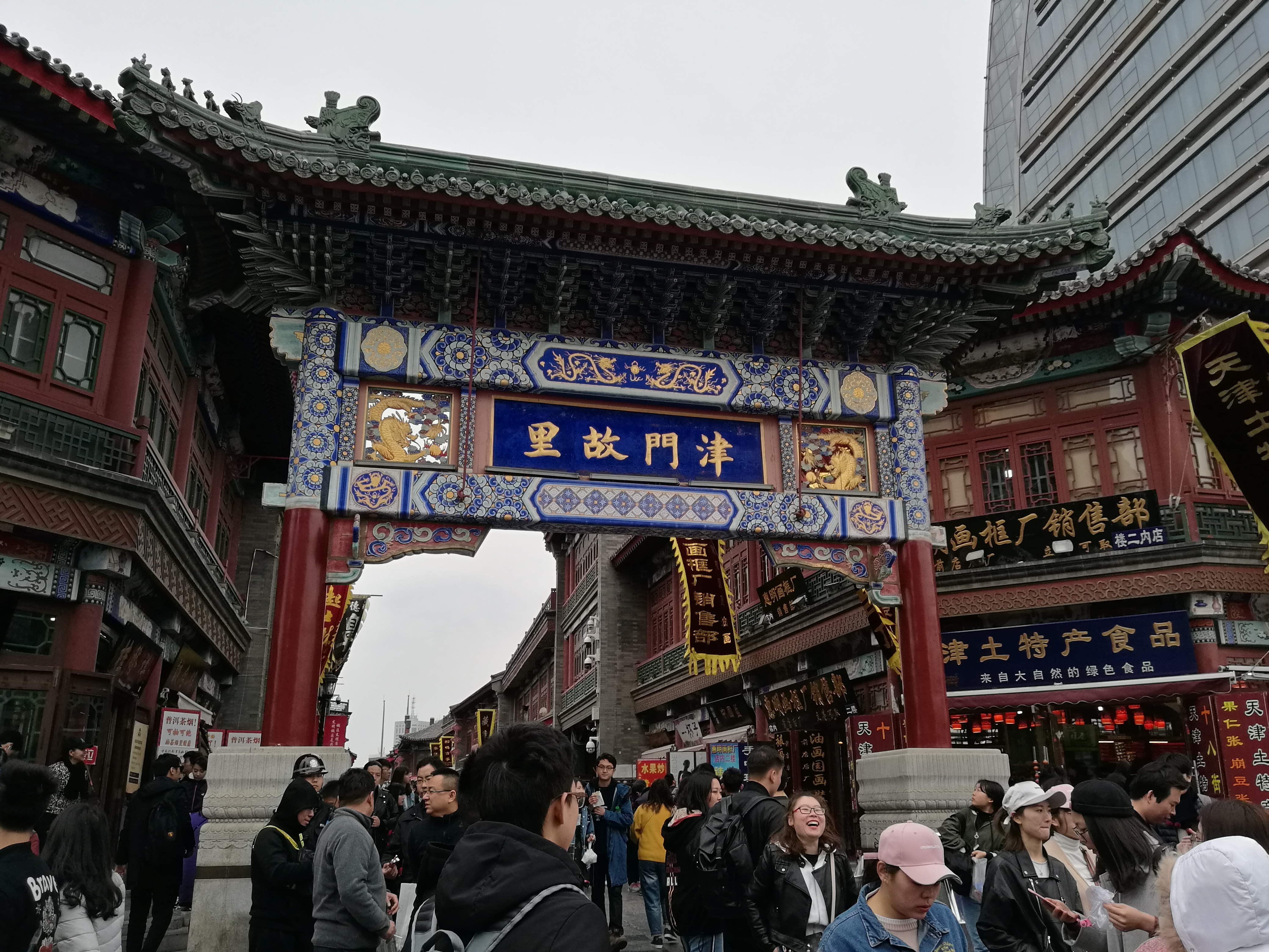 天津市津门故里